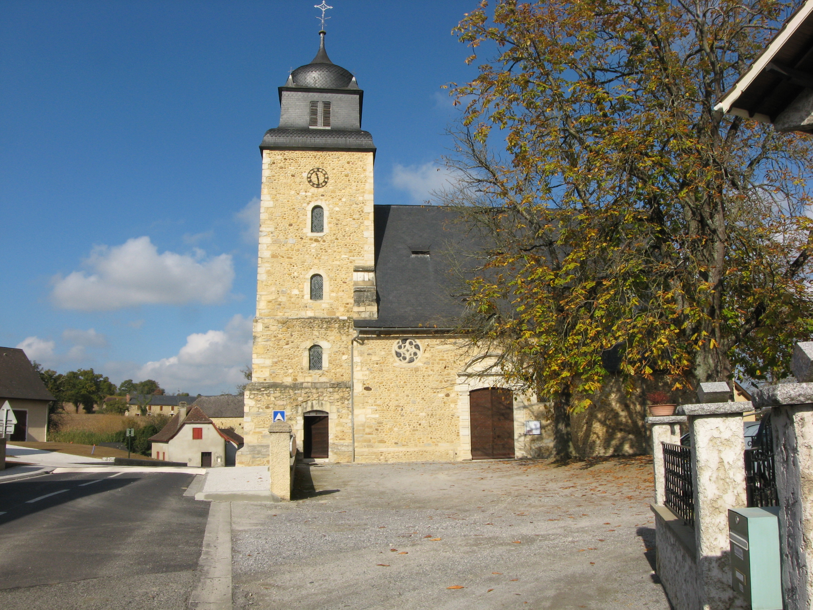 Eglise de Lahourcade (Pyrénées Atlantiques) Pyrénées).